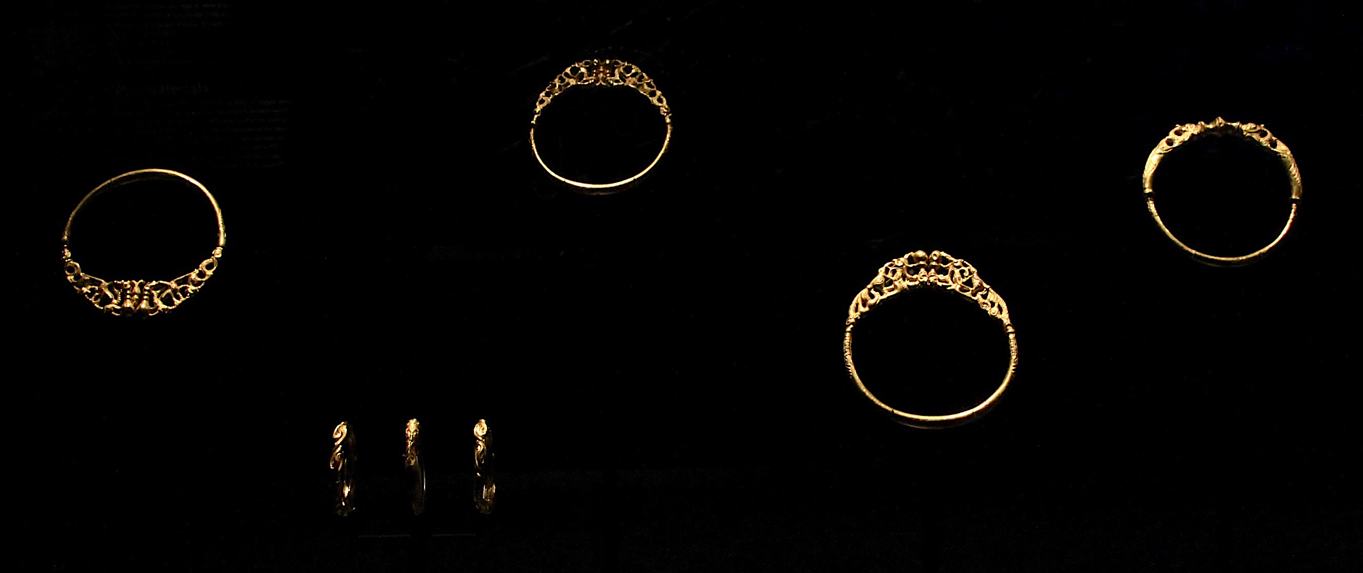 Goldschatz von Erstfeld alle sieben Ringe im Landesmuseum Zürich